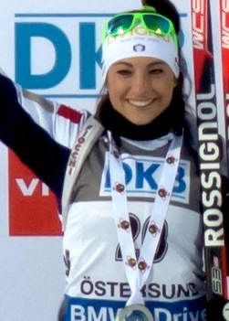 Dorothea Wierer efter jaktstarten i Östersund